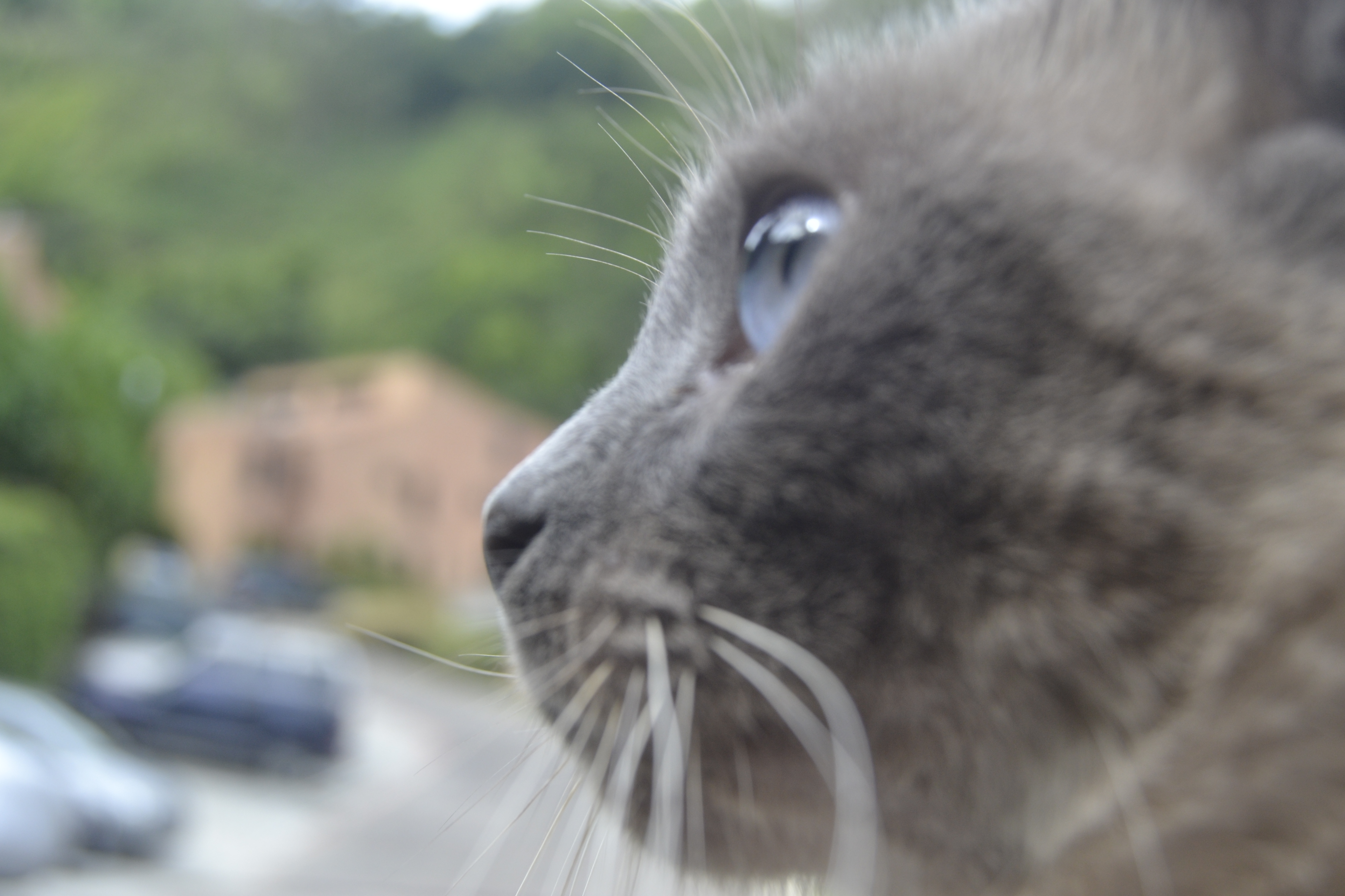 Esta es una foto de un gato siamés desde cerca para que se aprecien sus ojos azules y cara oscura